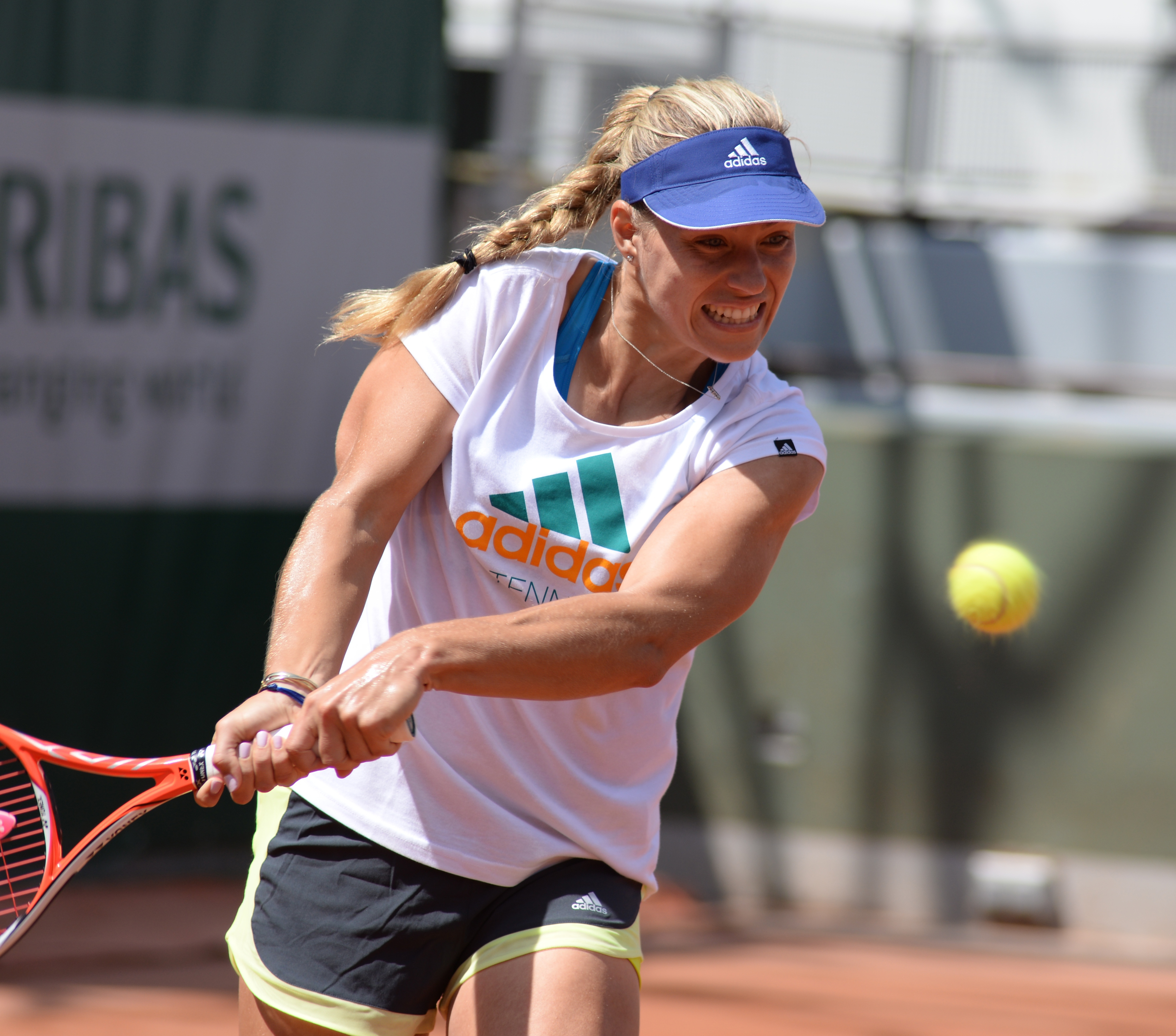 Angelique Kerber